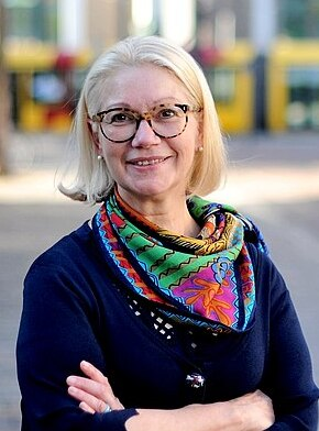 Michèle Lutz, maire de Mulhouse. Photo prise en 2017 au centre-ville de Mulhouse.